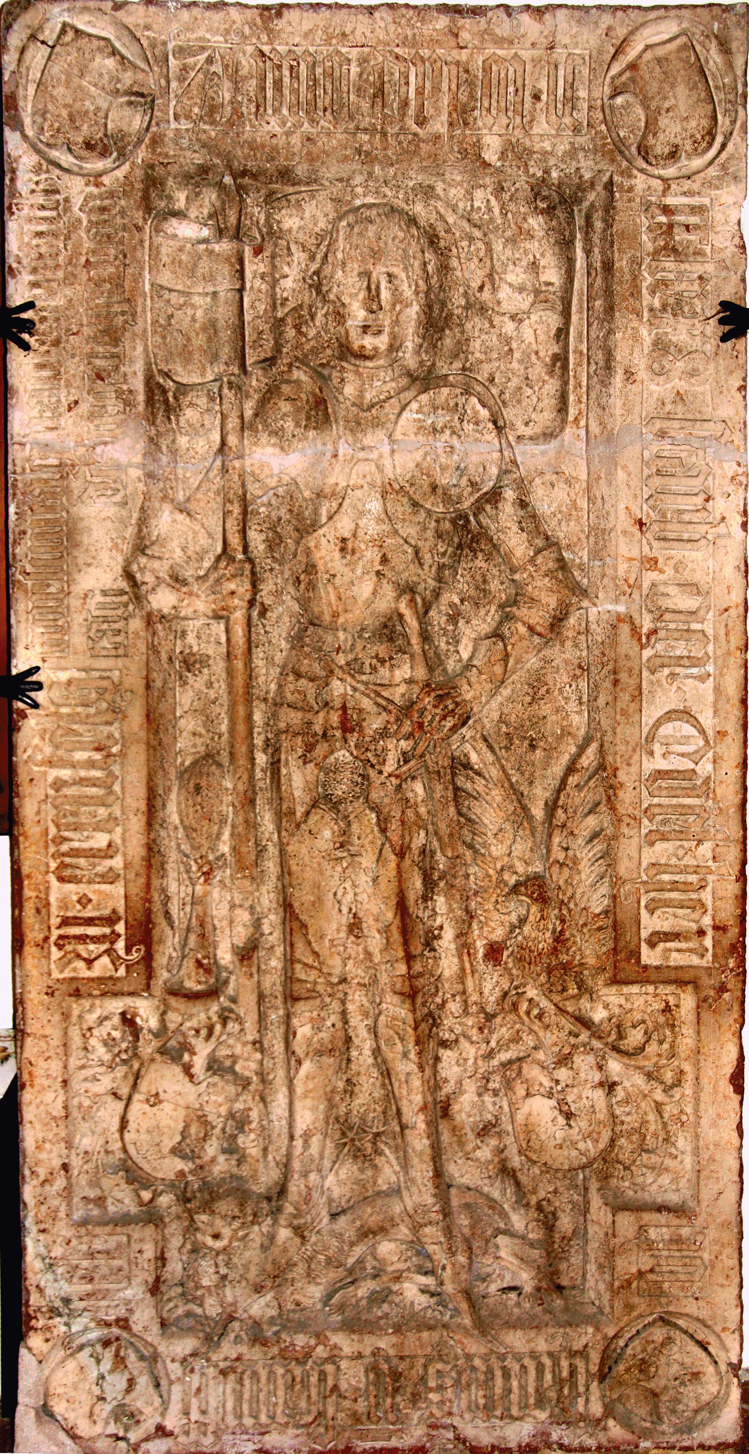 Die katholische Pfarrkirche St. Peter und Paul in Beratzhausen